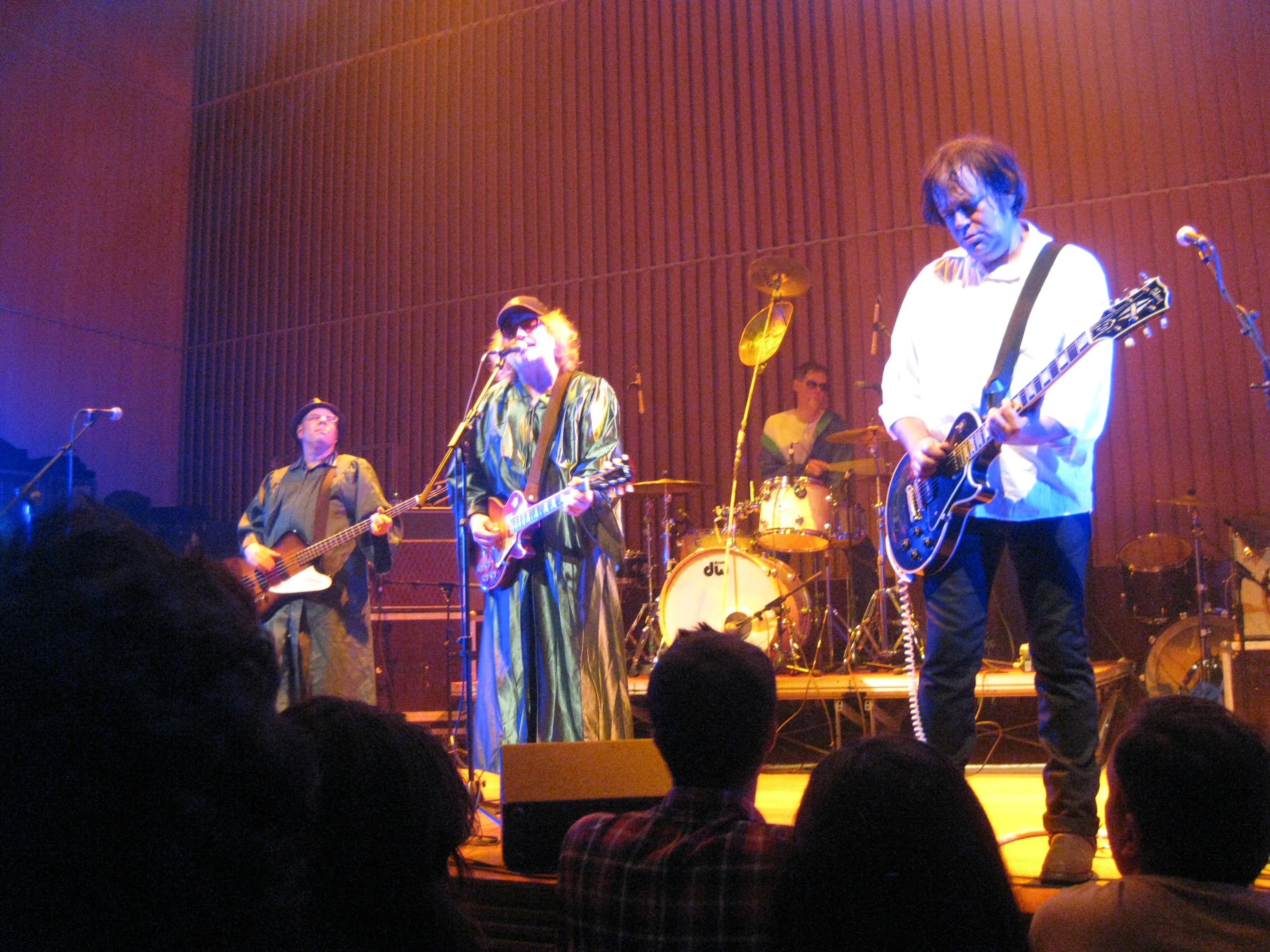 Young Fresh Fellows en directo na sala Capitol de Santiago de Compostela.